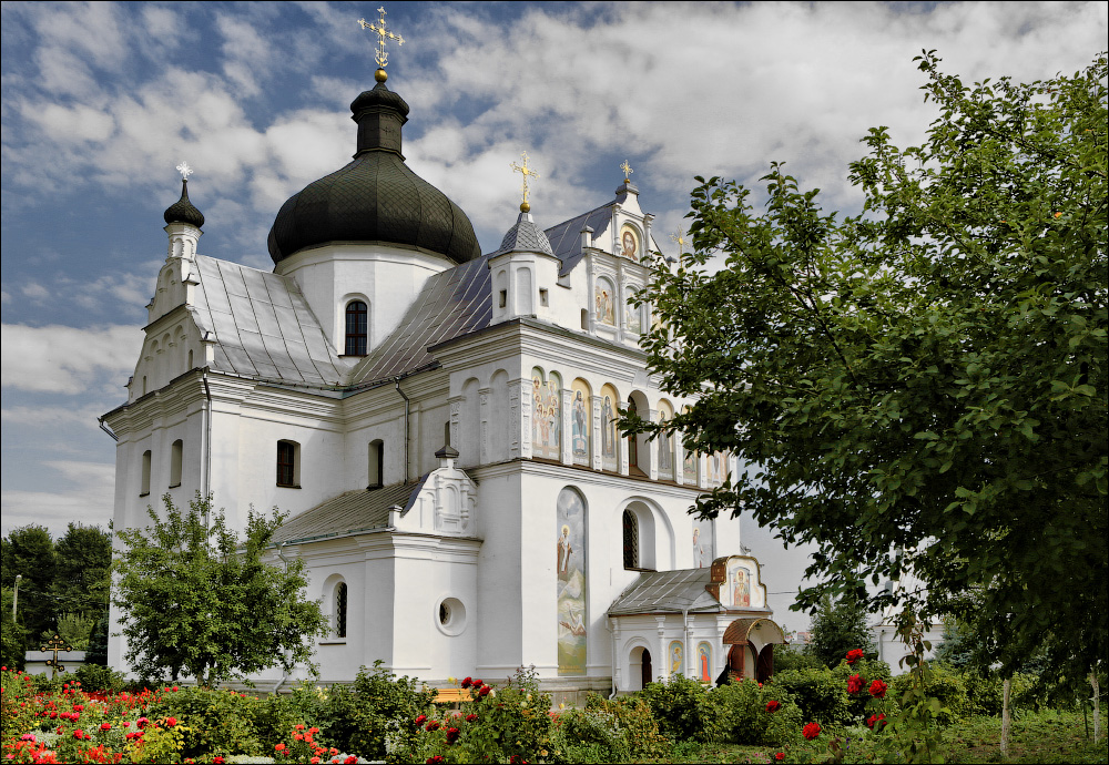 Магілёўскія відарысы